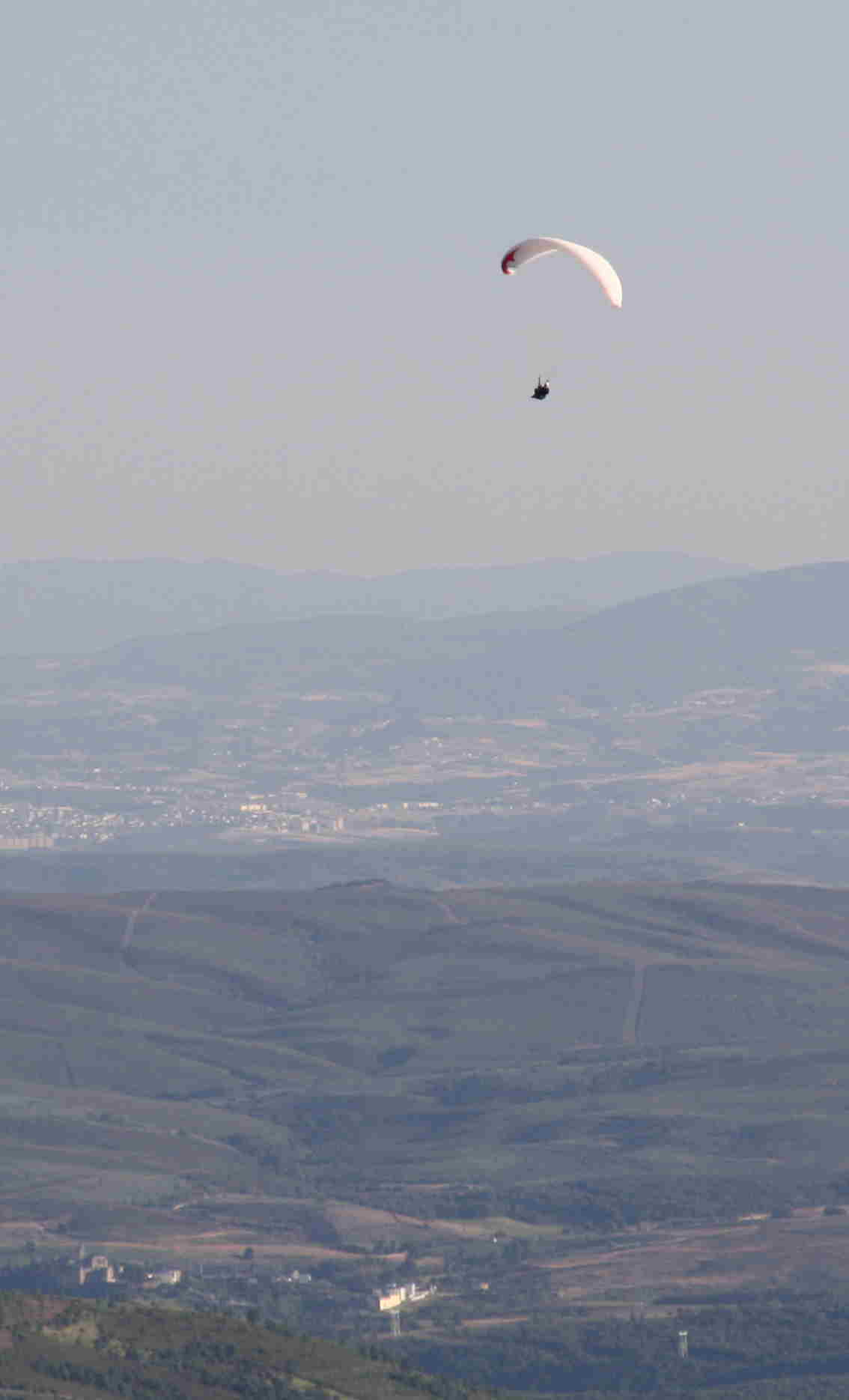 Subiendo la térmica de servicio sobre el valle de Doney.